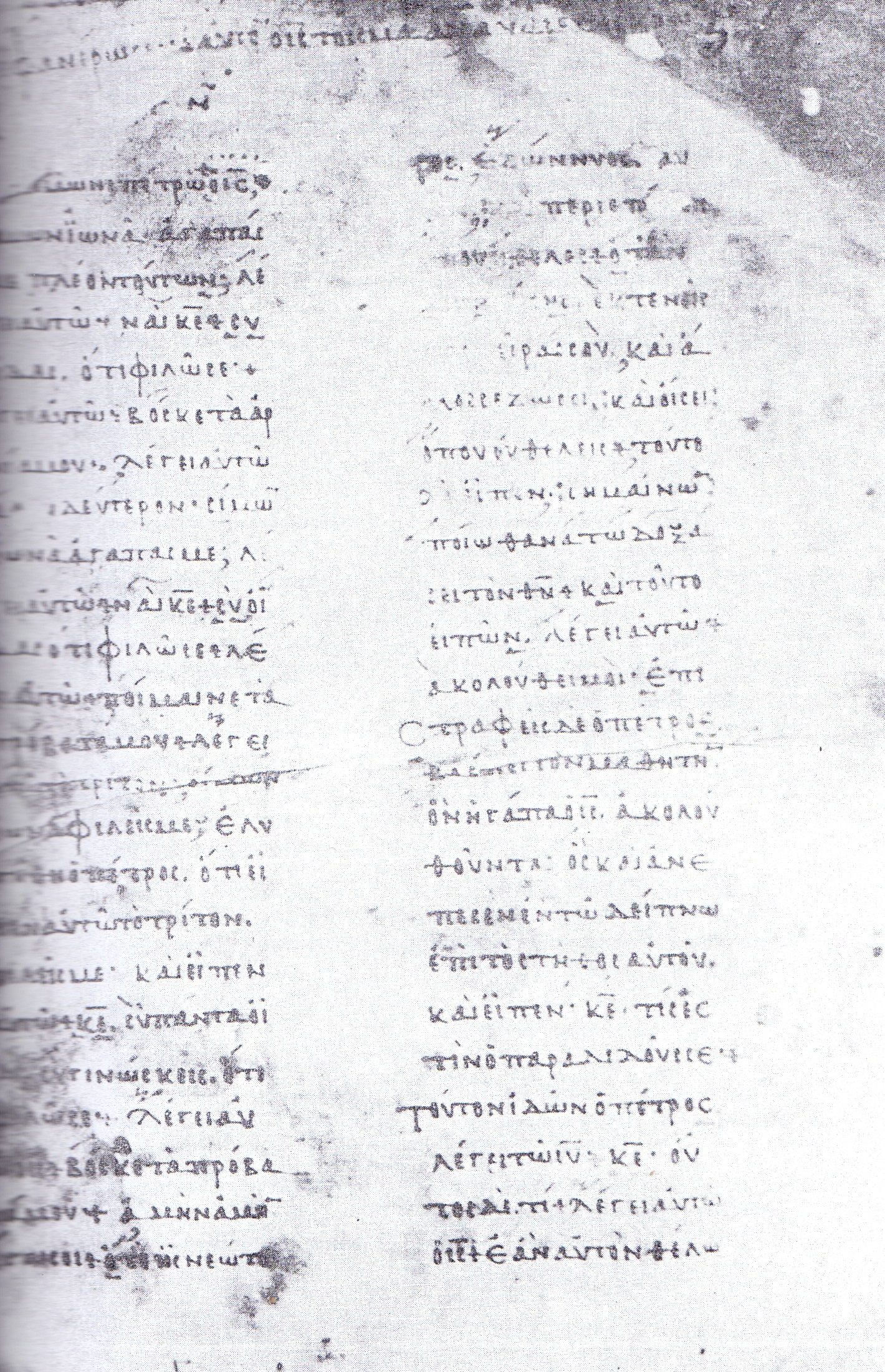 page with the text of John 21:15-22